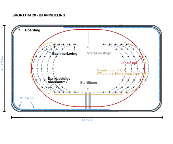 Een diagram met de indeling van een shorttrackbaan, met de posities van lijnen en markeringen.